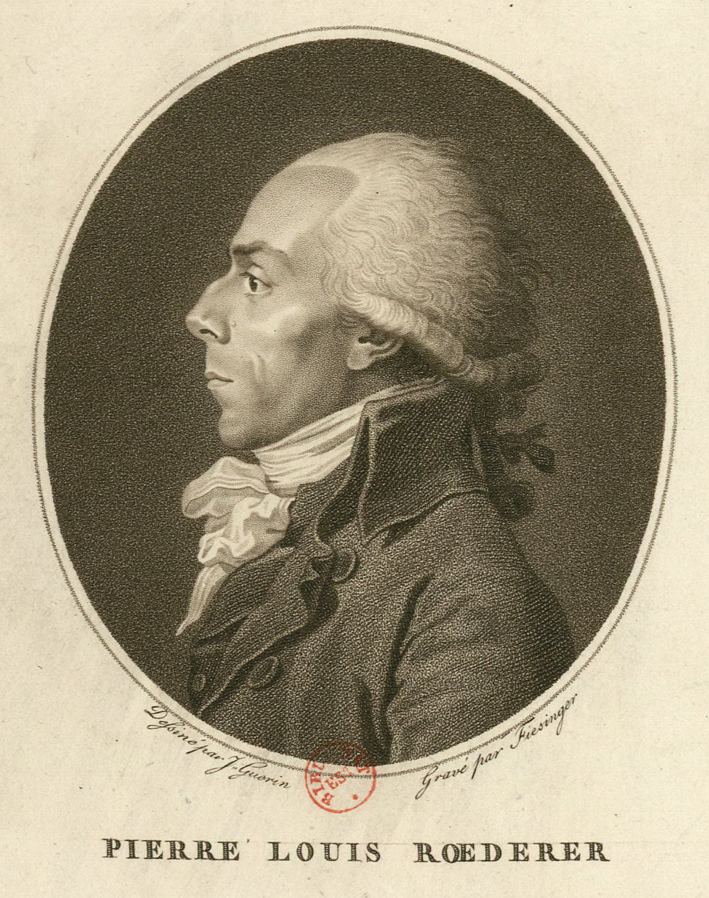 Pierre Louis Roederer : deputé de Metz à l'Assemblée nationale en 1789